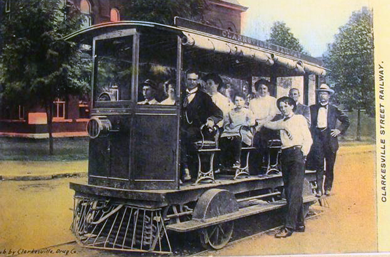 Railmotor